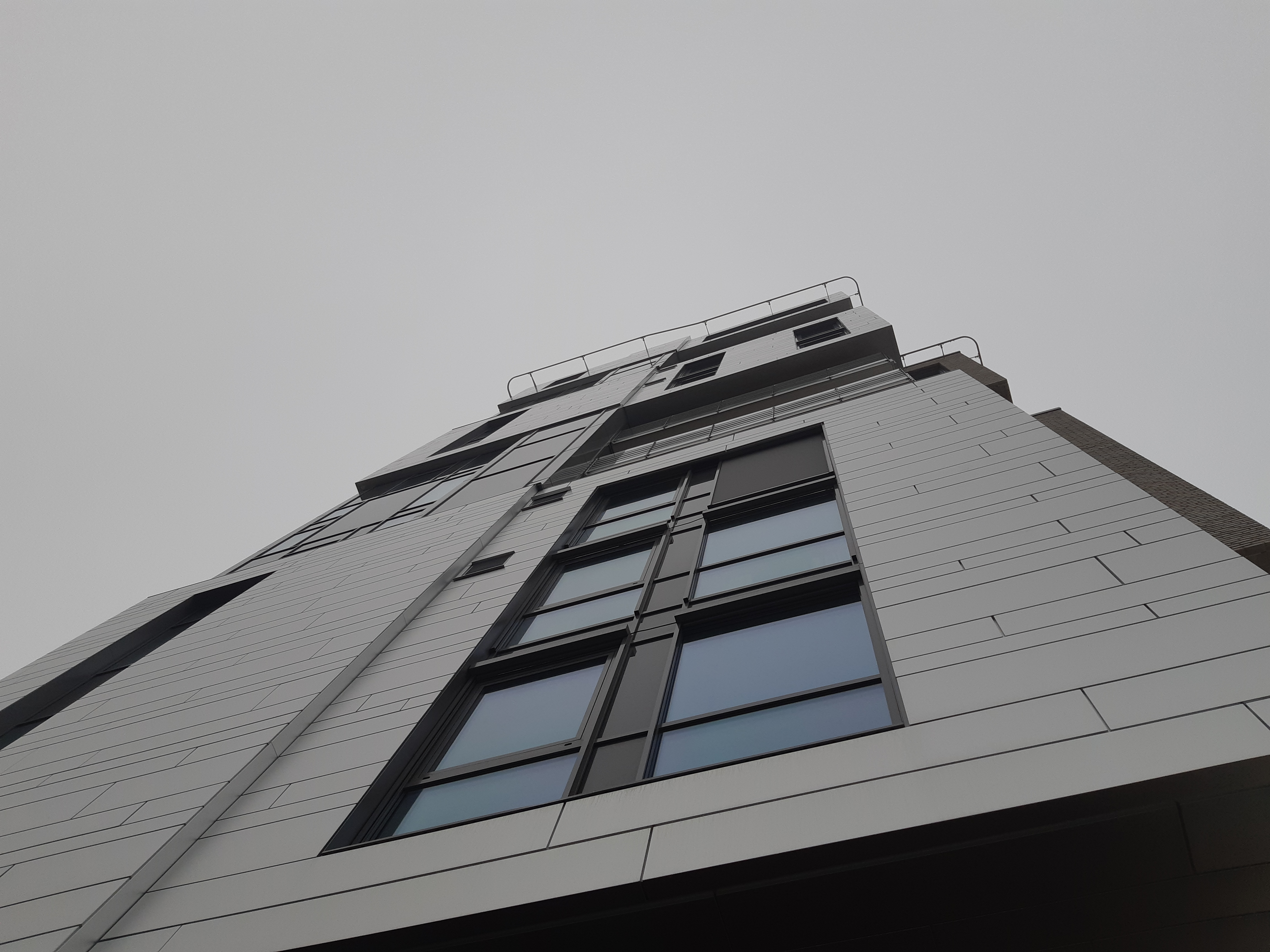 Det vakre Signaturbygget på Kaldnes i Tønsberg.